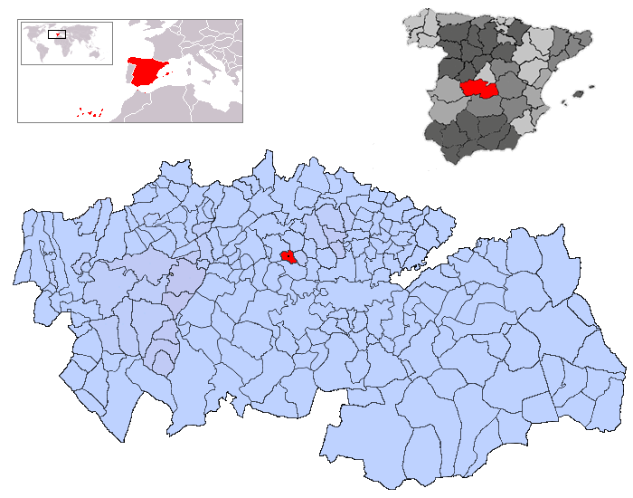 Torrijos en la provincia de Toledo